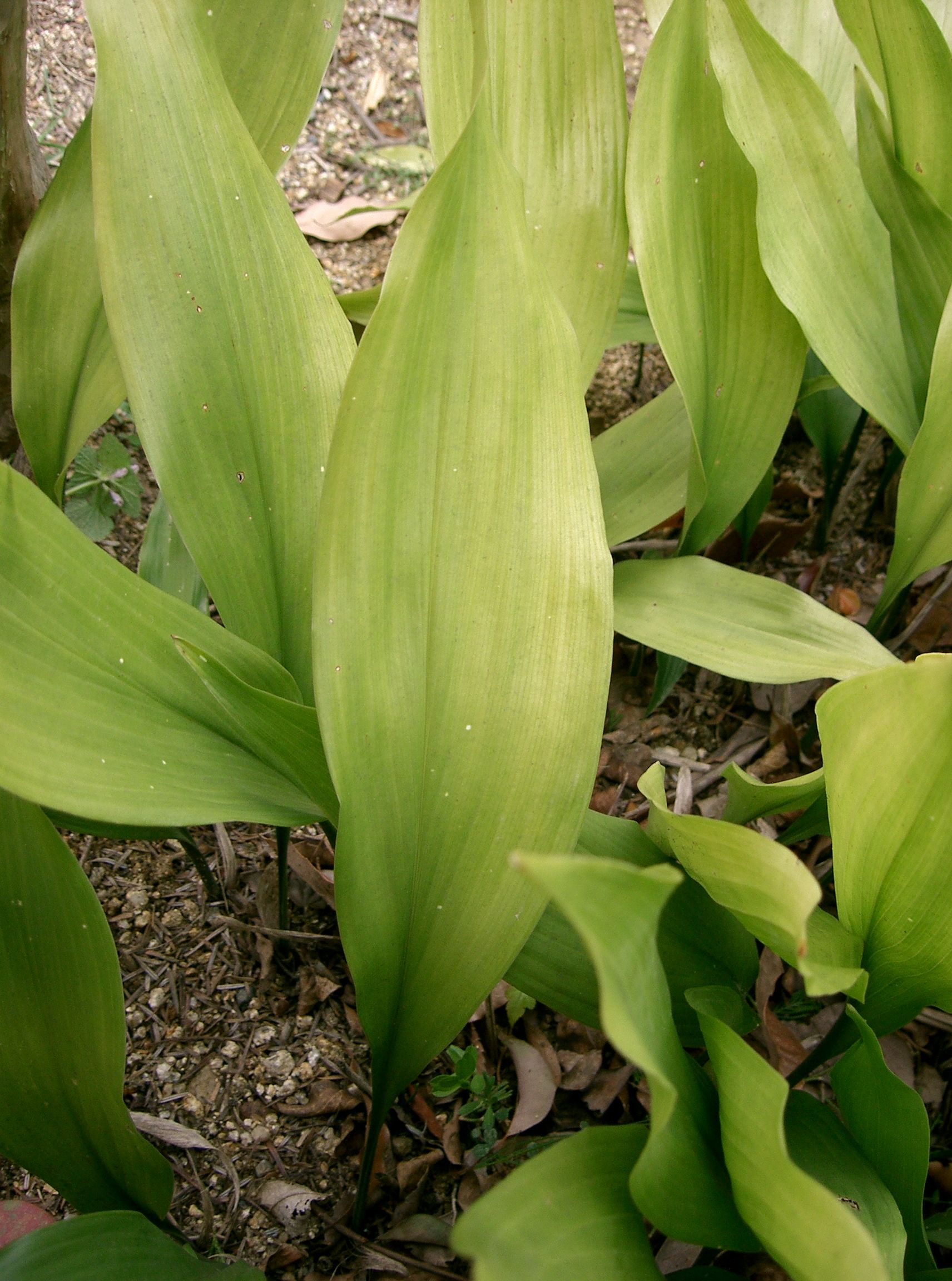 Scientific name: Aspidistra elatior